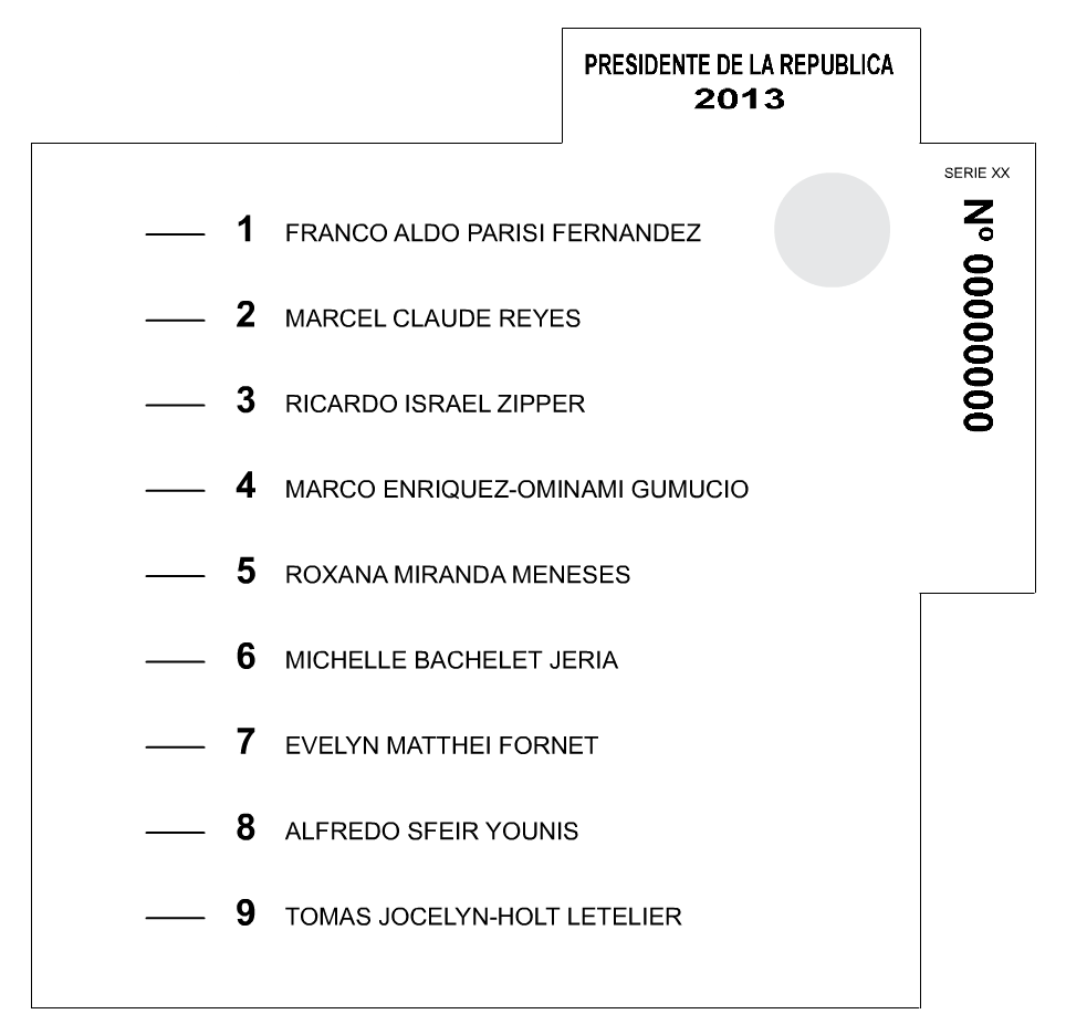 Reproducción de la cédula de votación utilizada en la elección presidencial de Chile de 2013.